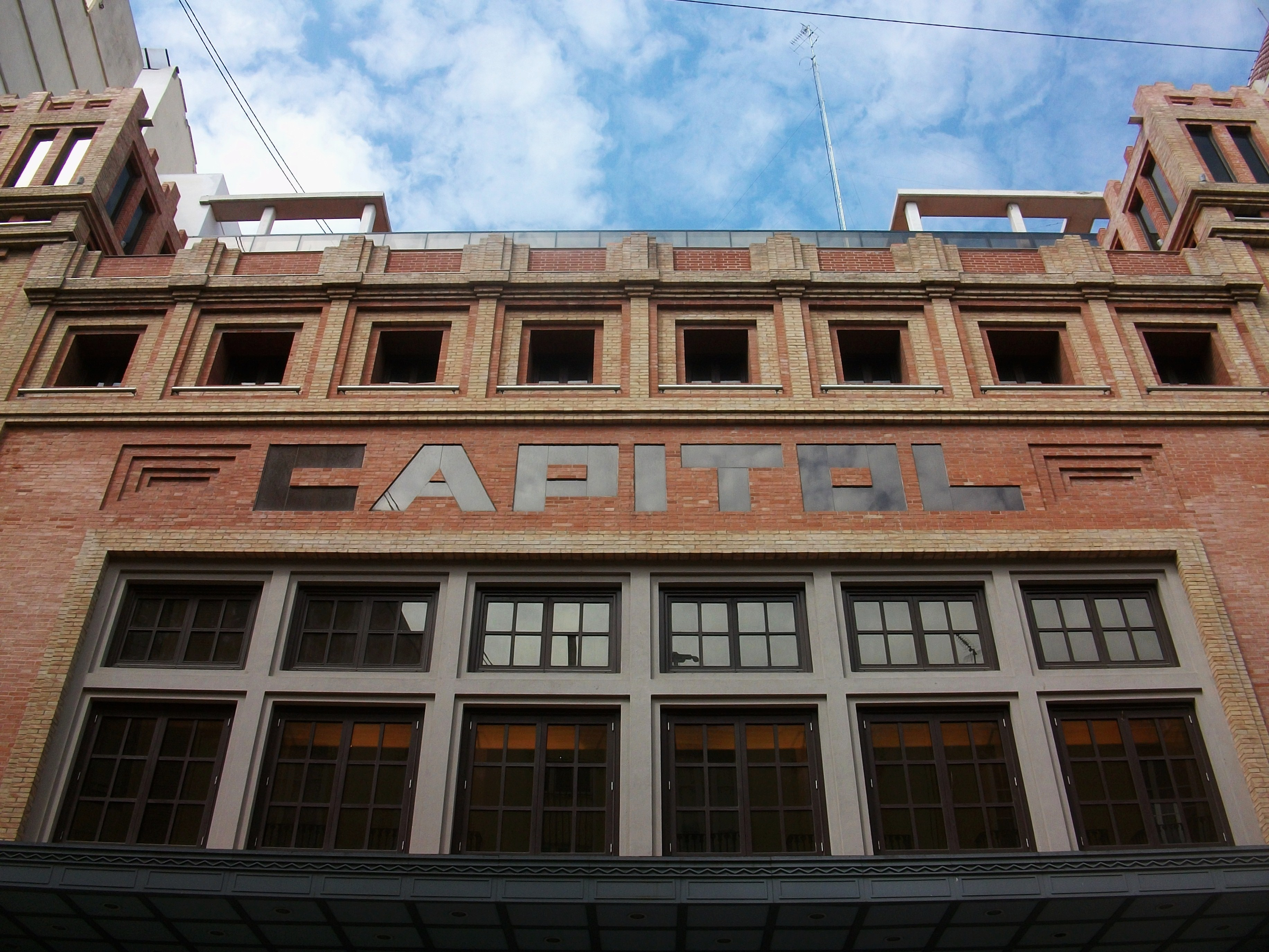 Antic cine Capitol de València, al carrer Ribera. De l'arquitecte Joaquín Rieta Síster, 1930.